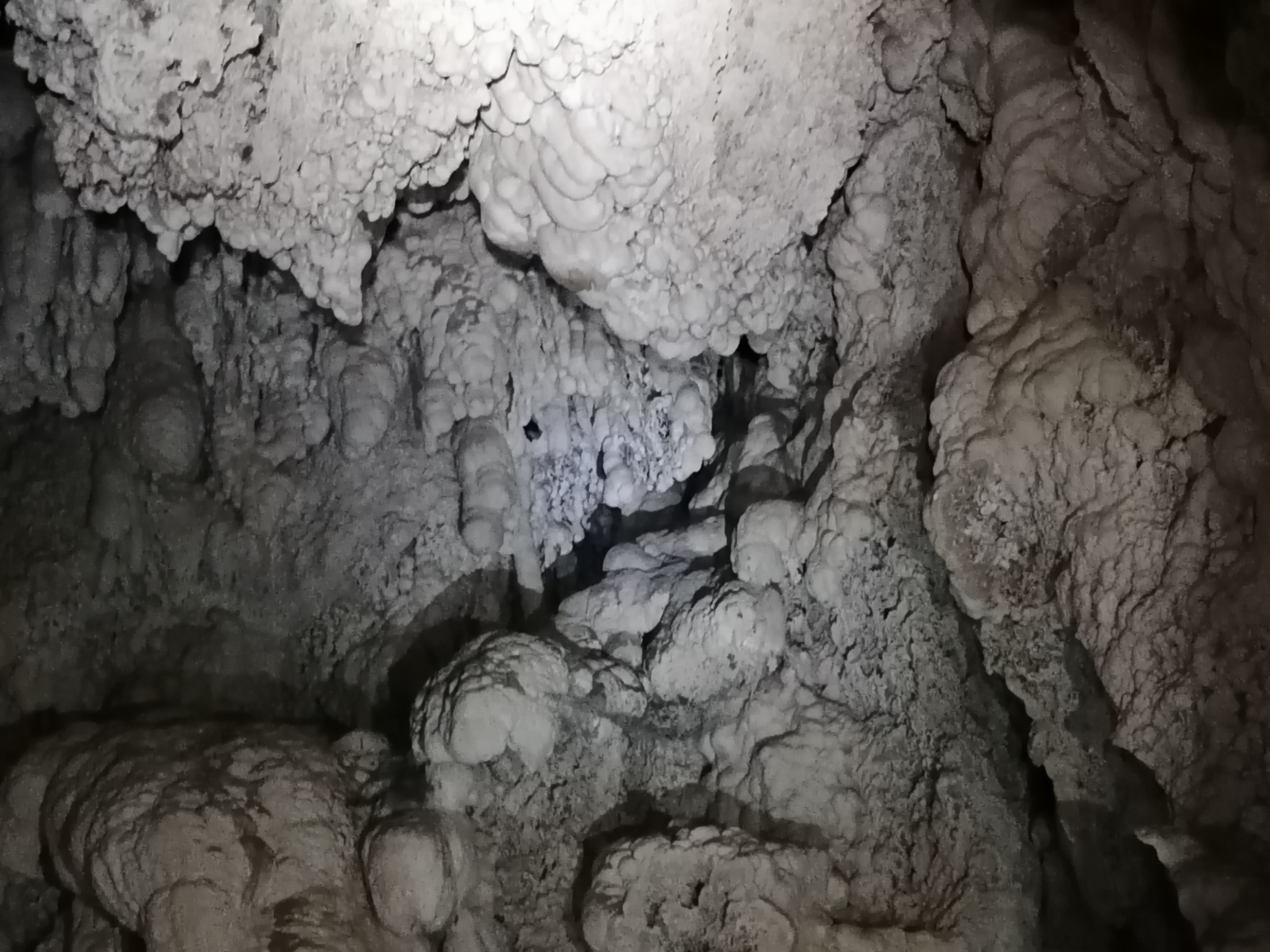 Φωτογραφία του Γεωργίου Καισαρίδη